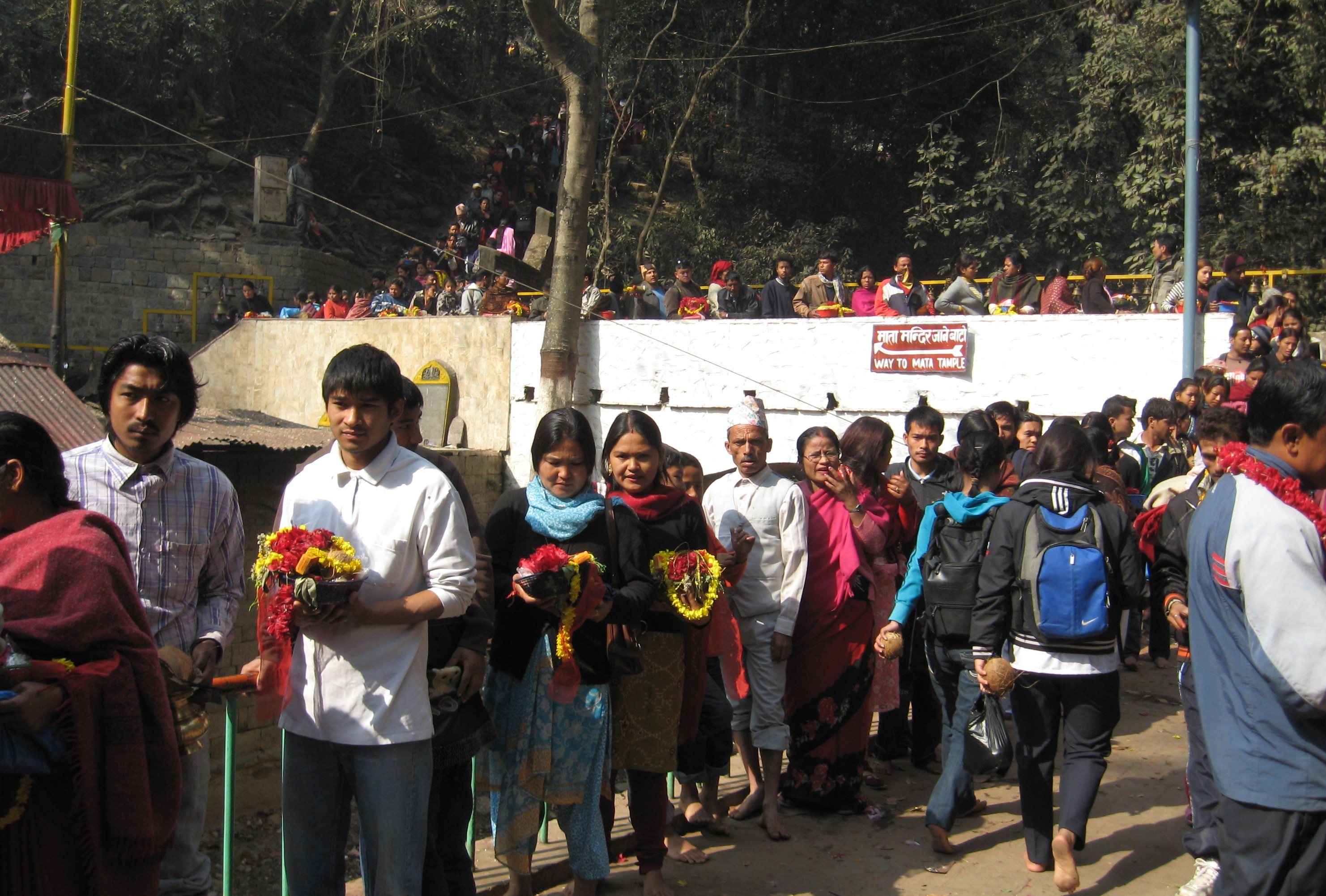 Dakshinkali